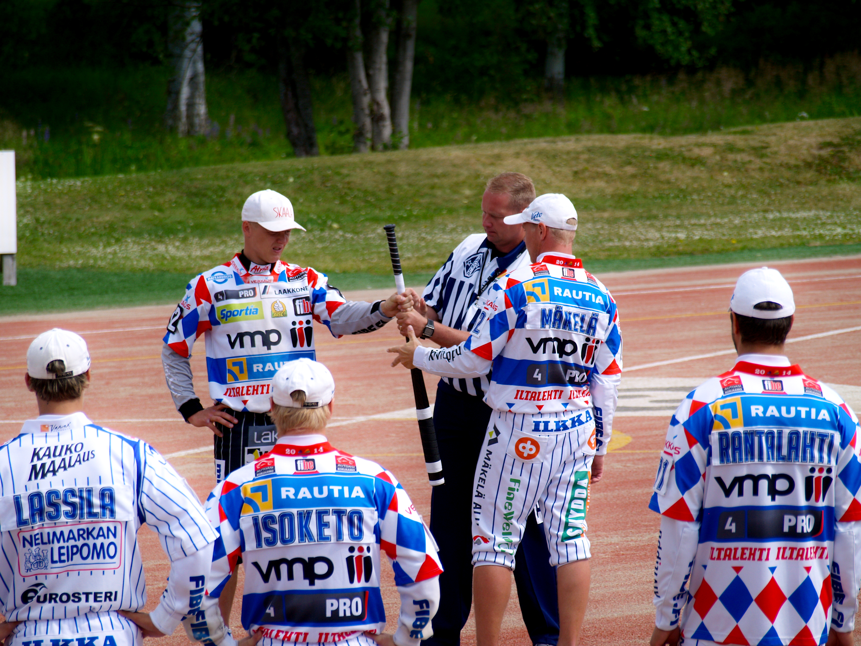 Hutunkeitto, Vimpelin Veto - JymyJussit pesäpallo-ottelussa 13.7.2014. Hutunkeitossa vastakkain Markku Hylkilä ja Janne Mäkelä.